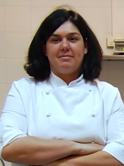 Celia Jiménez nació en Córdoba en 1970. Fue la primera mujer española en conseguir una Estrella de la Guía Michelín en 2006, cuando era jefa de cocina del restaurante 'El Lago' en Marbella (Málaga). Su interés por el mundo de la cocina y la hostelería despiertó cuando tenía 16 años, y empezó a trabajar como camarera en un restaurante cordobés. Aún así, empezó la carrera de Historia en la Universidad de Córdoba, aunque, finalmente, la dejó aparcada para irse a estudiar restauración a la Escuela de Hostelería La Cónsula en Churriana (Málaga). En 2008, regresa a su ciudad natal como jefa del taller de investigación y desarrollo en Bodegas Campos. Da la casualidad que aquí es donde empezó a trabajar como camarera. Actualmente, es también la máxima responsable de la cocina de la Escuela de Hostelería de Córdoba.